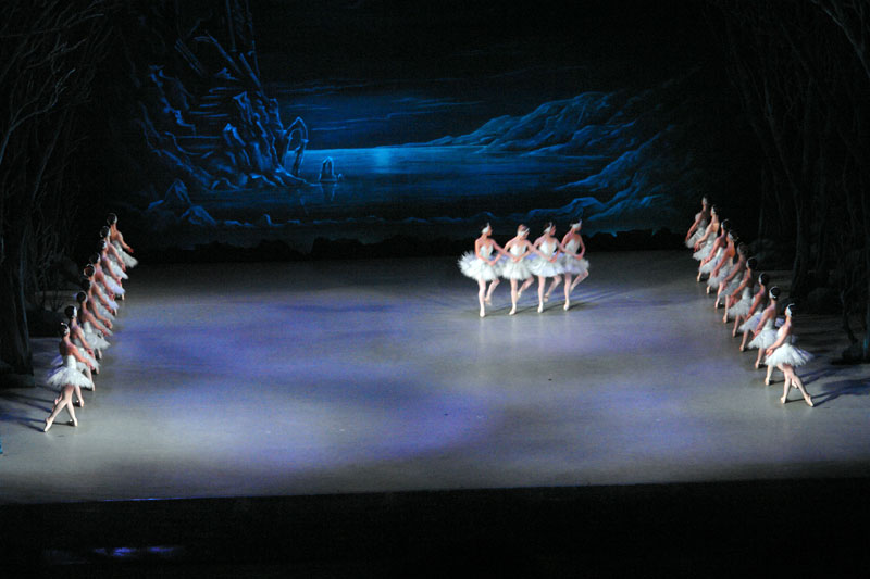 Swan Lake ballet